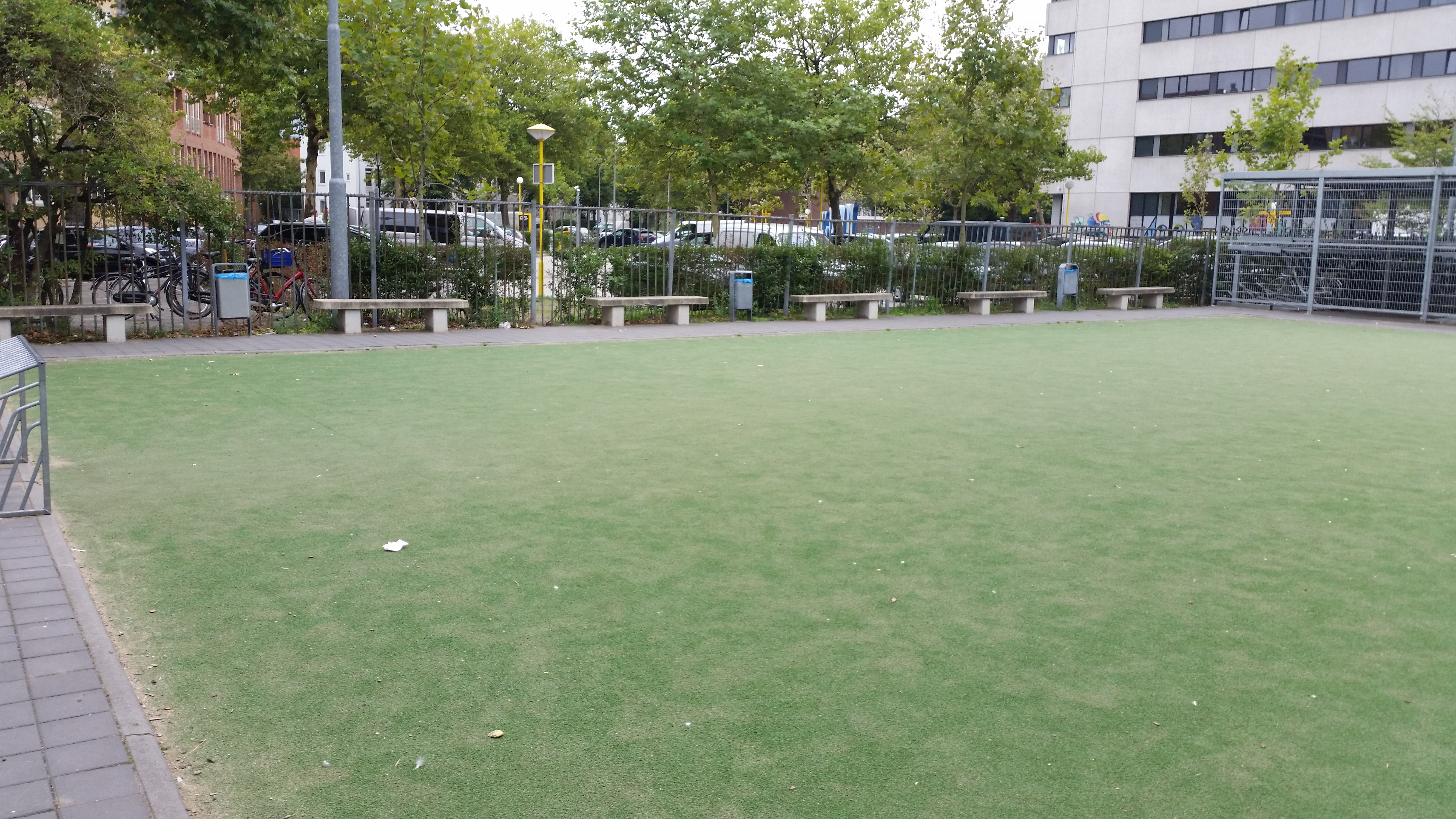 Vrolikstraat 8 (benches), dit zijn bankjes die later geplaatst zijn dan het gebouw (rijksmonument) en vallen ook niet onder de monumentstatus van de oorspronkelijke bankjes (eveneens rijksmonument)